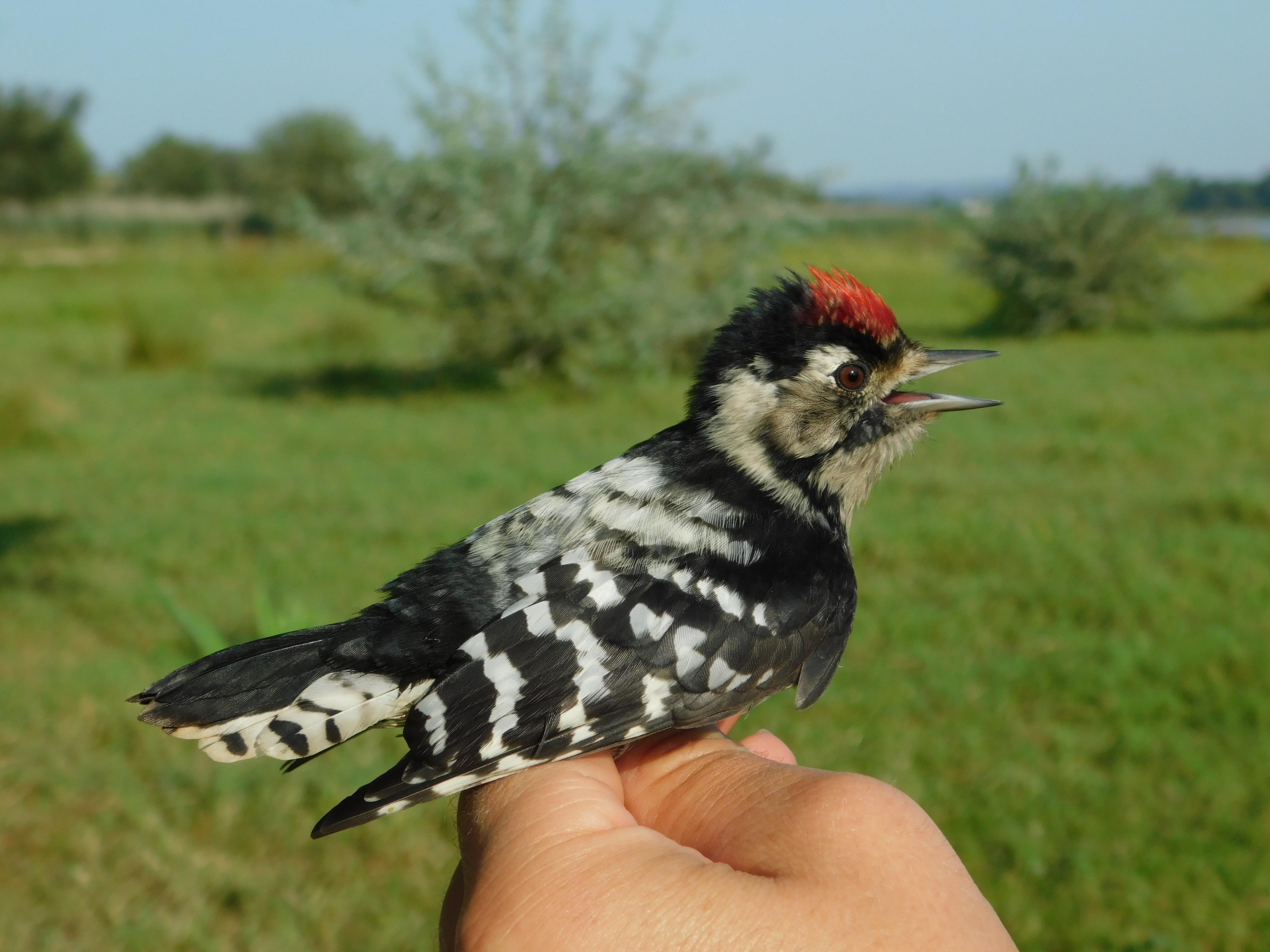 Srpski (latinica): Prisutan je u celoj Evropi osim dela Velike Britanije i većeg dela Pirinejskog poluostrva, u Maloj Aziji i u većem delu umerene i centralne Azije do obala Tihog okeana. Uglavnom je stanarica. Stanište su mu zrelije listopadne šume (posebno mekih lišćara), parkovi, voćnjaci i sl, pretežno u ravnicama i pobrđu. Gnezdi se u dupljama u drveću koje sam pravi. Hrani se insektima i njihovim larvama koje nalazi ispod kore drveta. Preovlađujući trend populacije u Evropi je nepoznat. U Srbiji je populacija stabilna i procenjuje se da broji između 4.000 i 5.000 parova (Puzović et al 2015).